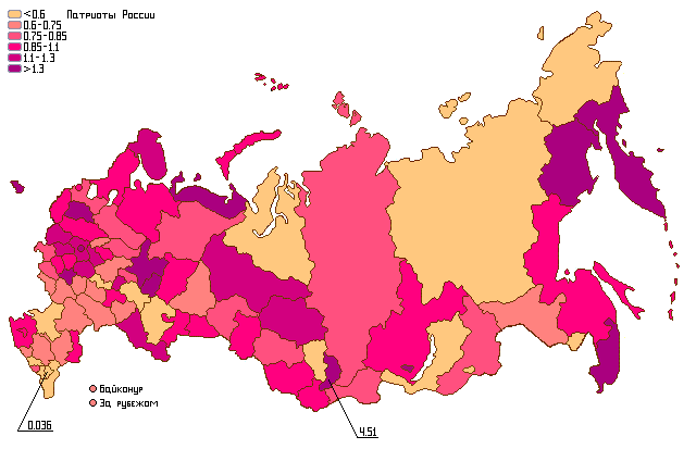 Результаты политической партии "Патриоты России" на парламентских выборах 2007 года (по регионам)